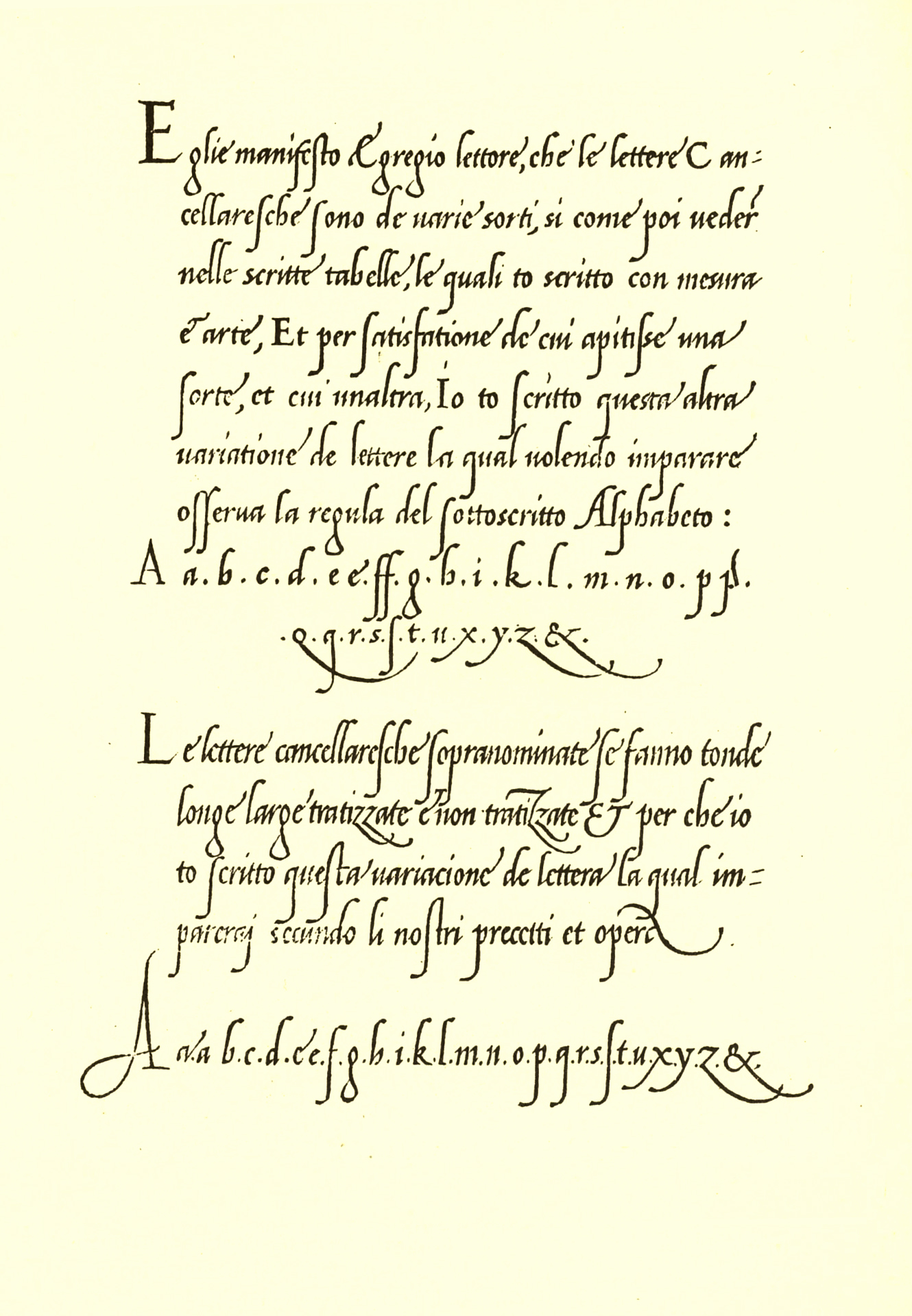 Aus dem Schreibmeisterbuch von Giovanni Antonio Tagliente:"Lo presente libro insegna la vera arte de lo excellête scrivere...". Venedig 1524.